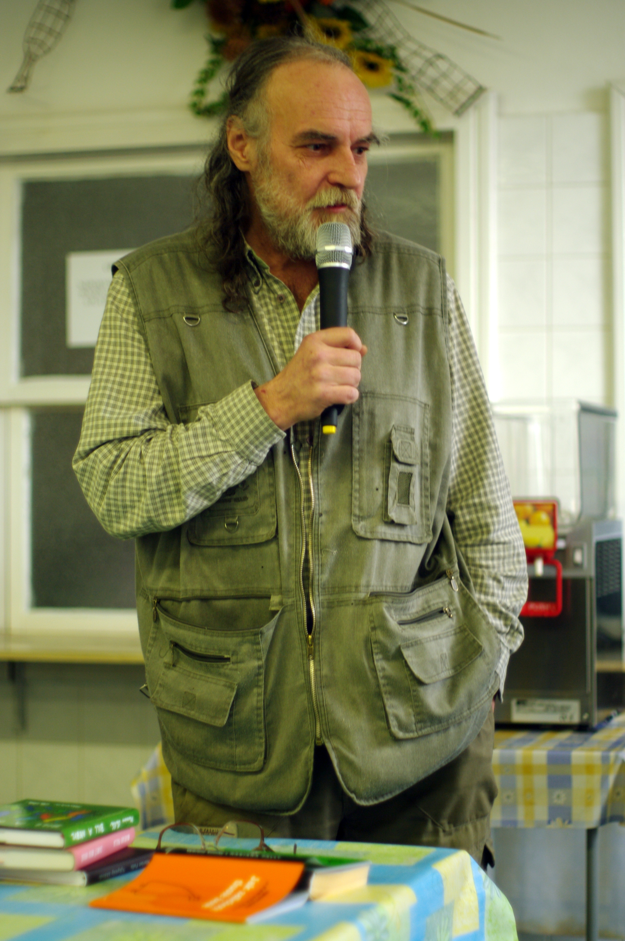 Marian Palla na besedě v jazykovém gymnáziu v Ostravě-Porubě